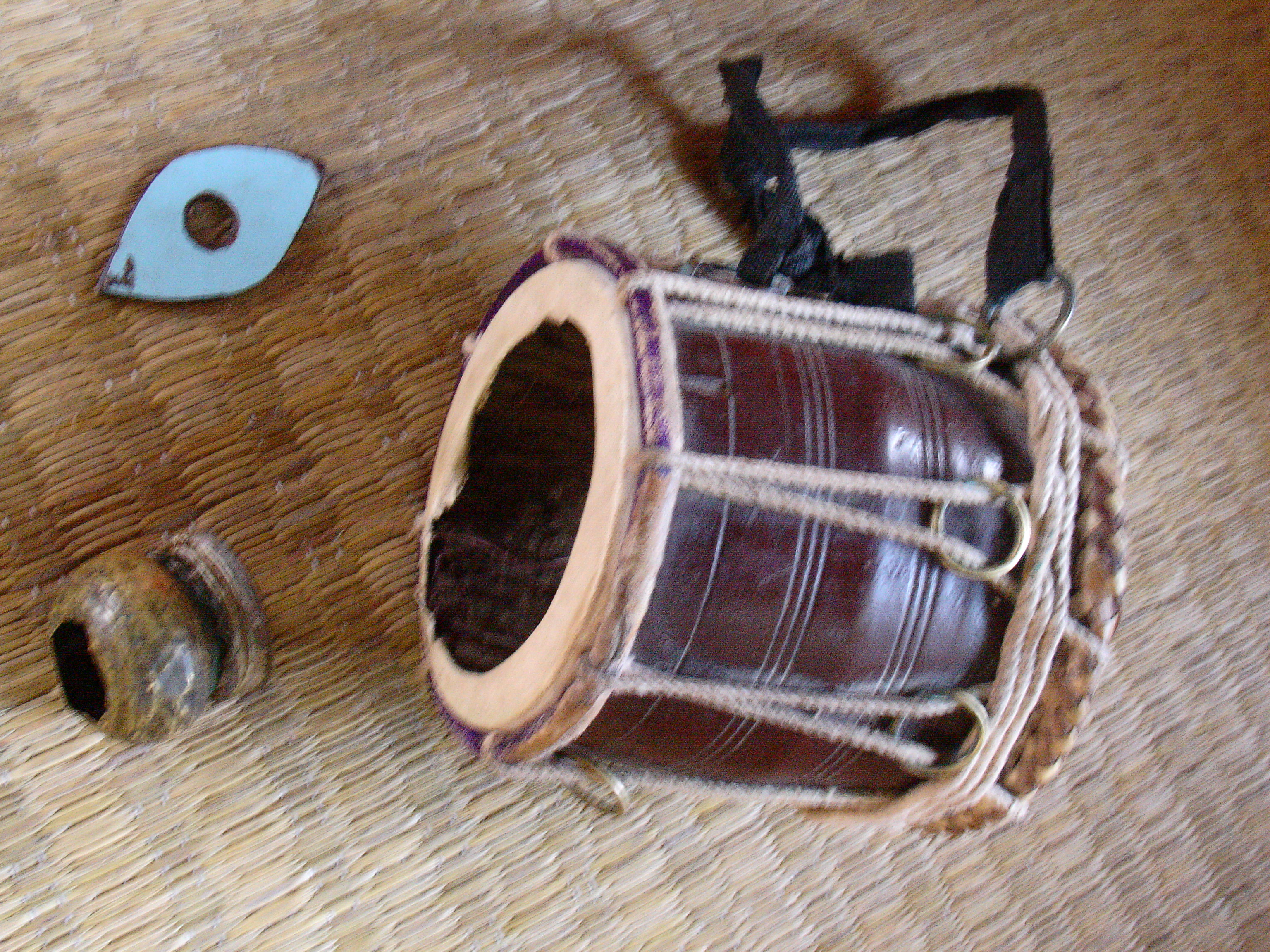 गुबगुबी